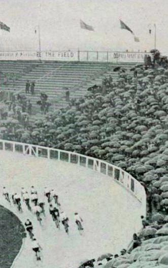 La course des 100 kilomètres cyclistes, aux JO de Londres 1908.